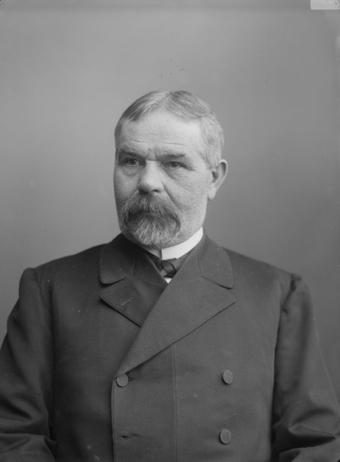 Меморский, Александр Михайлович